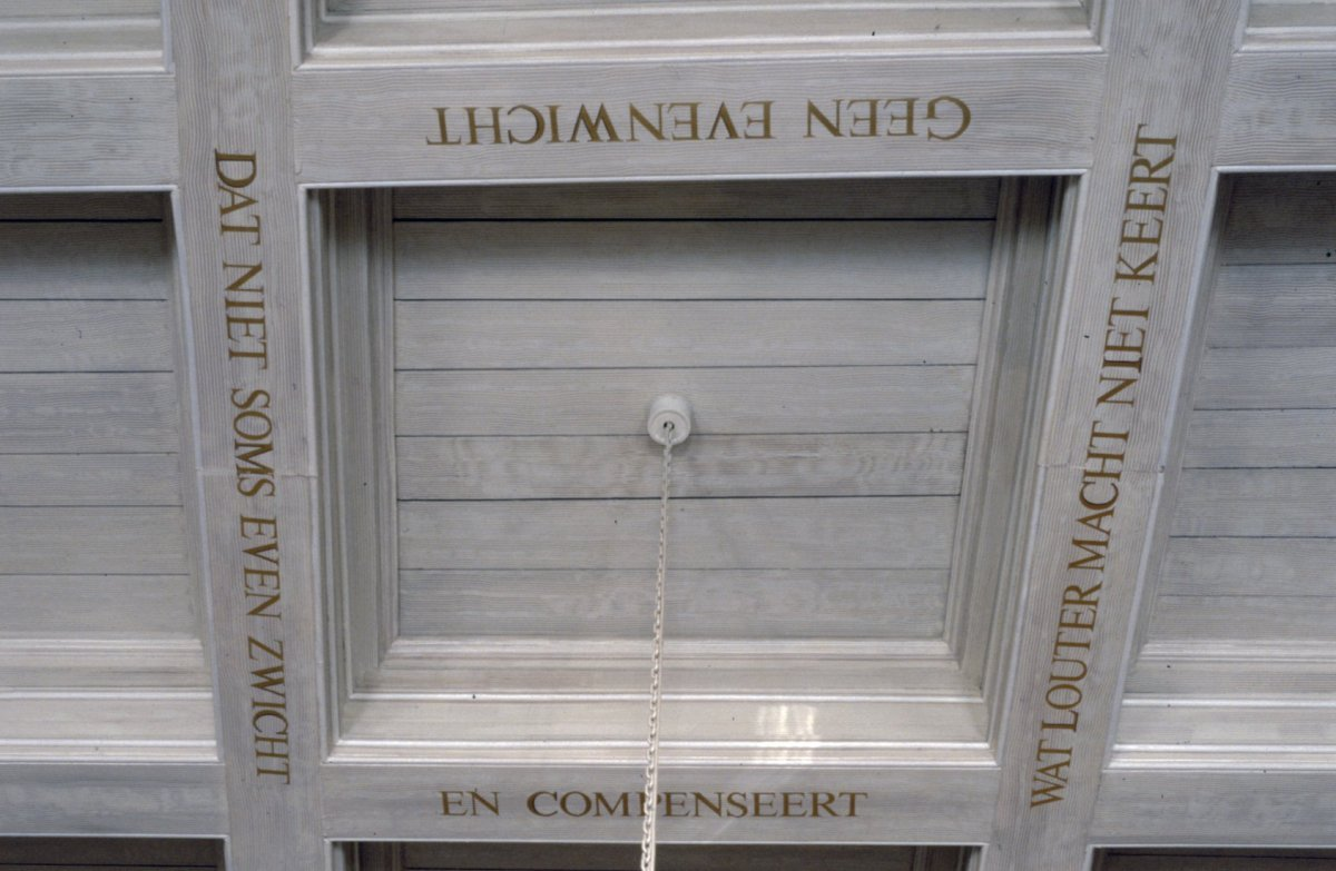 Stadhuis: Interieur eerste verdieping, raadzaal, cassetteplafond met dichtregel van J.C. van Schagen